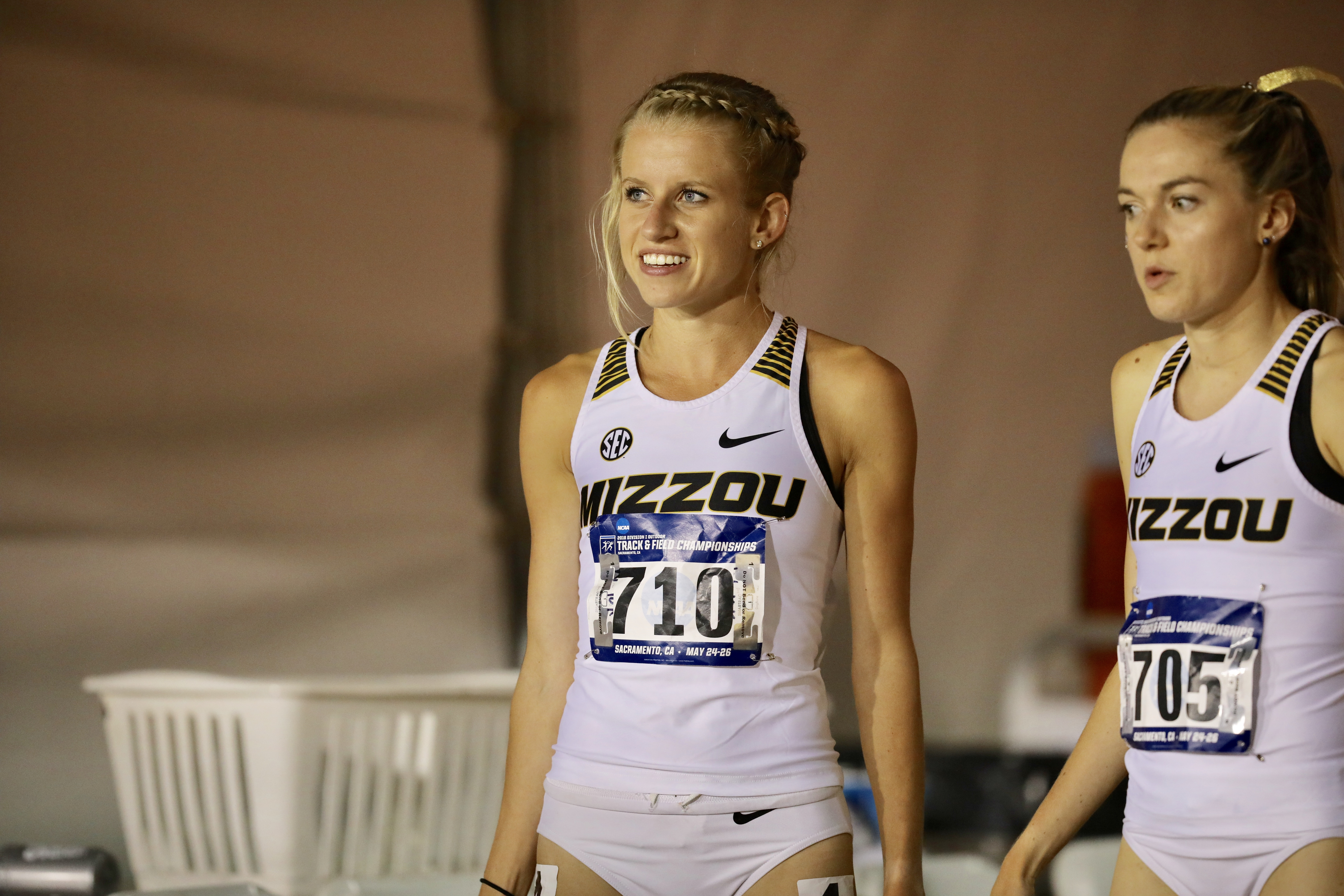 At NCAA West 2018